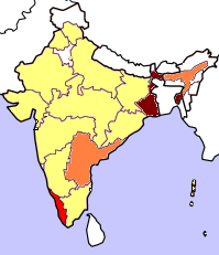 Lok Sabha 1996. Gjord av Soman.